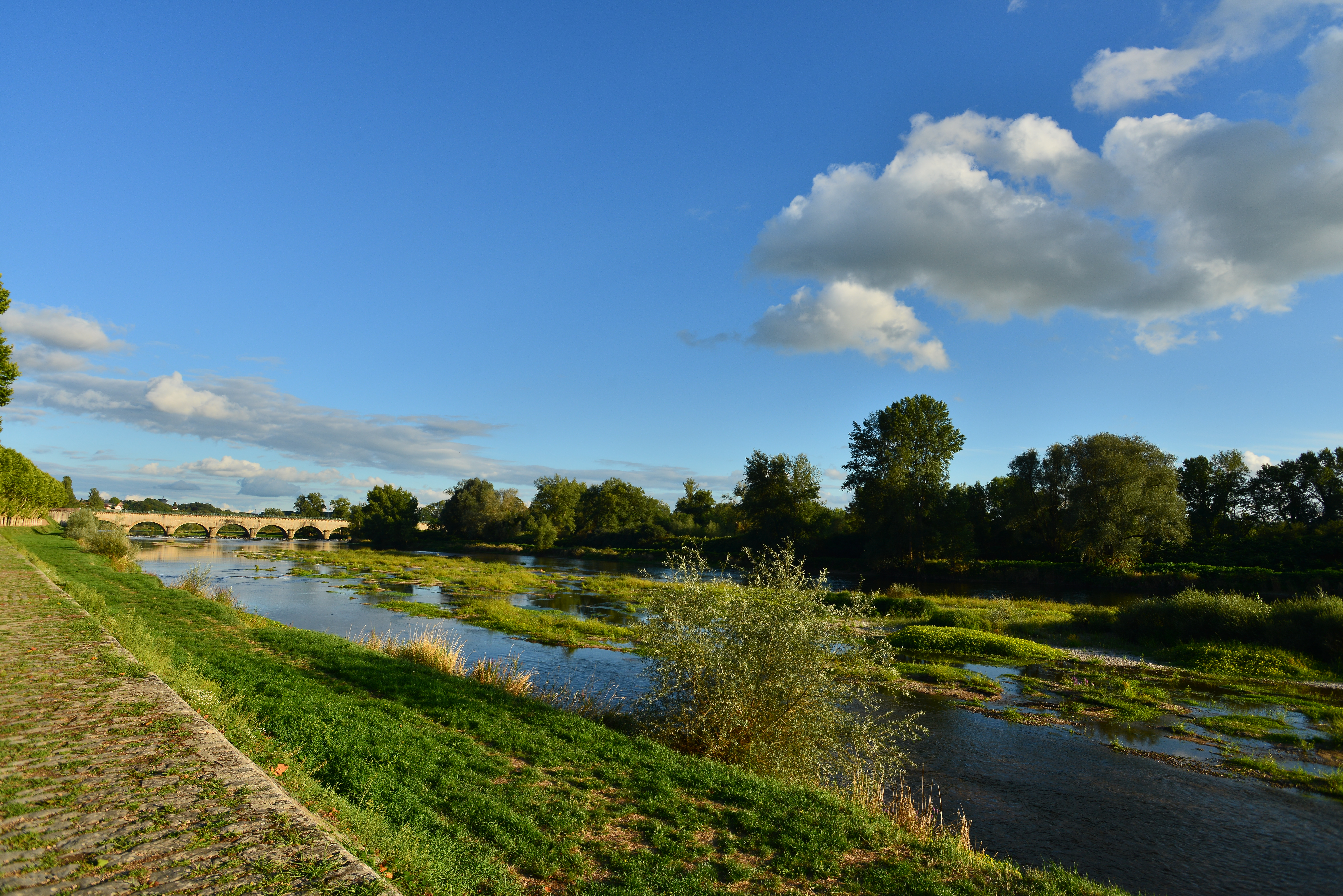 Sur cette photo, suite à un mois de juillet caniculaire, le niveau de la Loire est très bas.